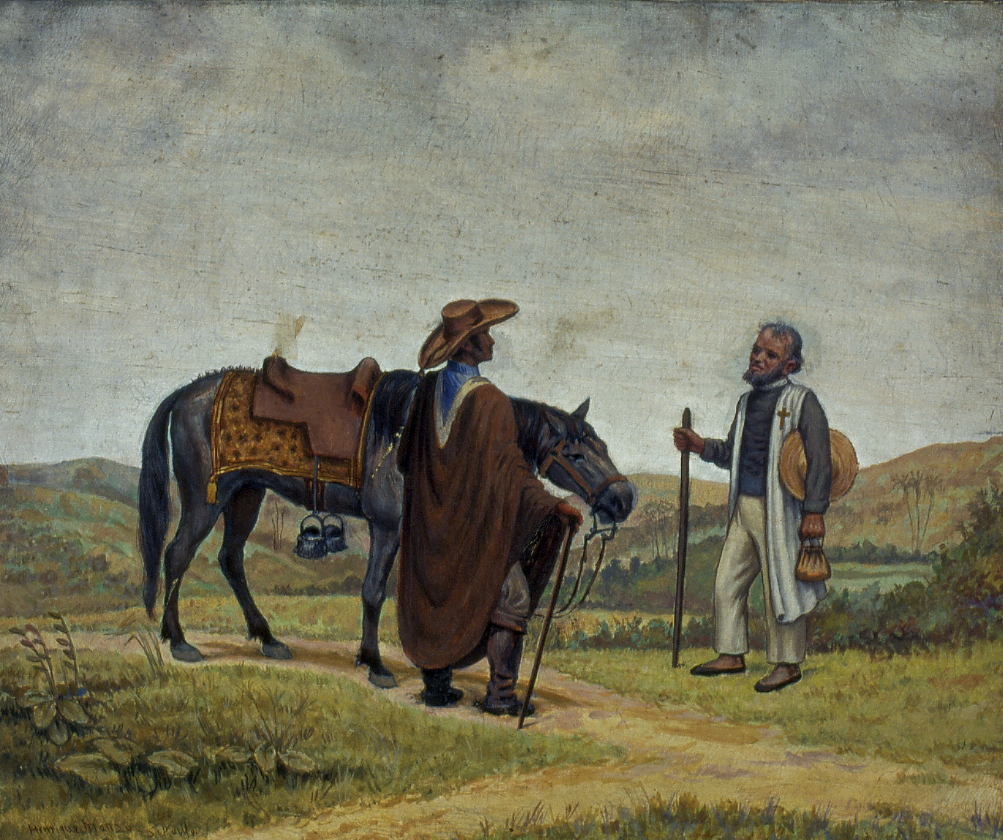 Obra que integra o acervo do Museu Paulista da USP. Coleção Fundo Museu Paulista - FMP